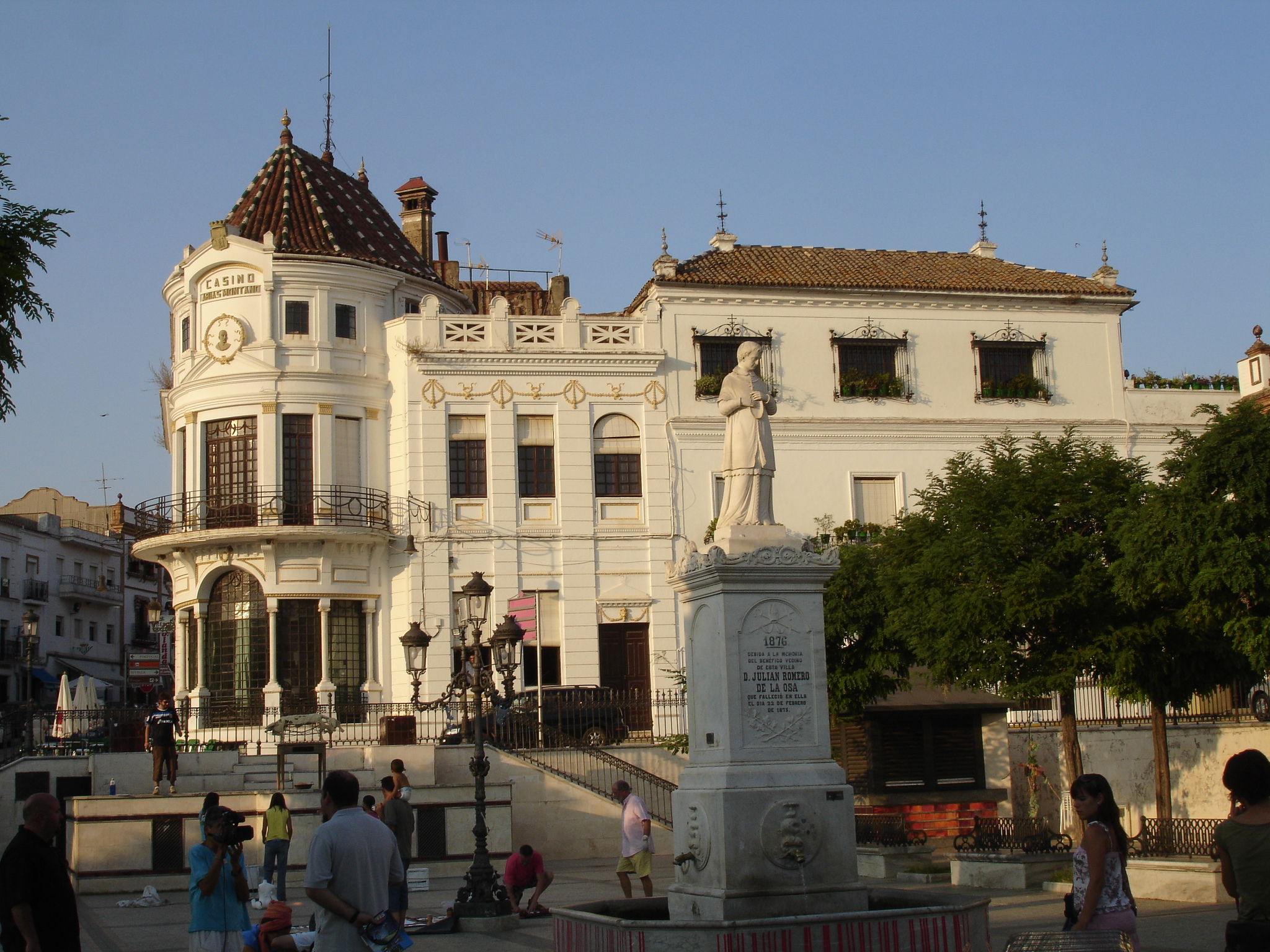 Edificio del Casino. Aracena (Huelva, España). Fotografía por comakut.